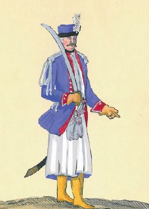 Brygadier Lubowiecki komendant 3 Brygady Kawalerii Narodowej (oficer III BKN Stefana Lubowidzkiego)